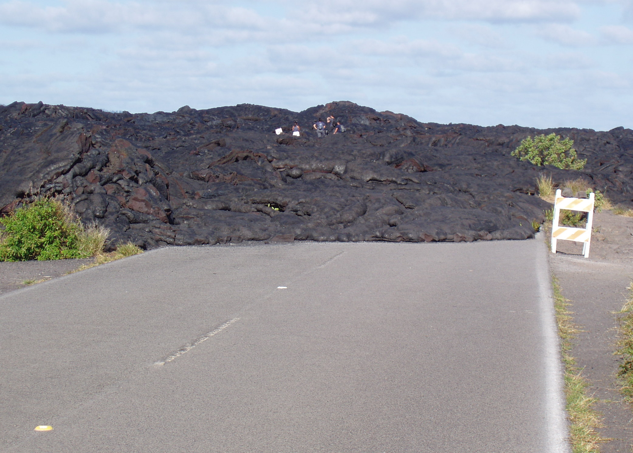 Kustweg, onder lava bedolven in het Hawaii Volcanoes National Park, een nationaal park in het zuiden van het eiland Hawaï in de staat Hawaï in de Verenigde Staten. Zelfgemaakte foto, Jos-uit-Boston, 27 januari 2007